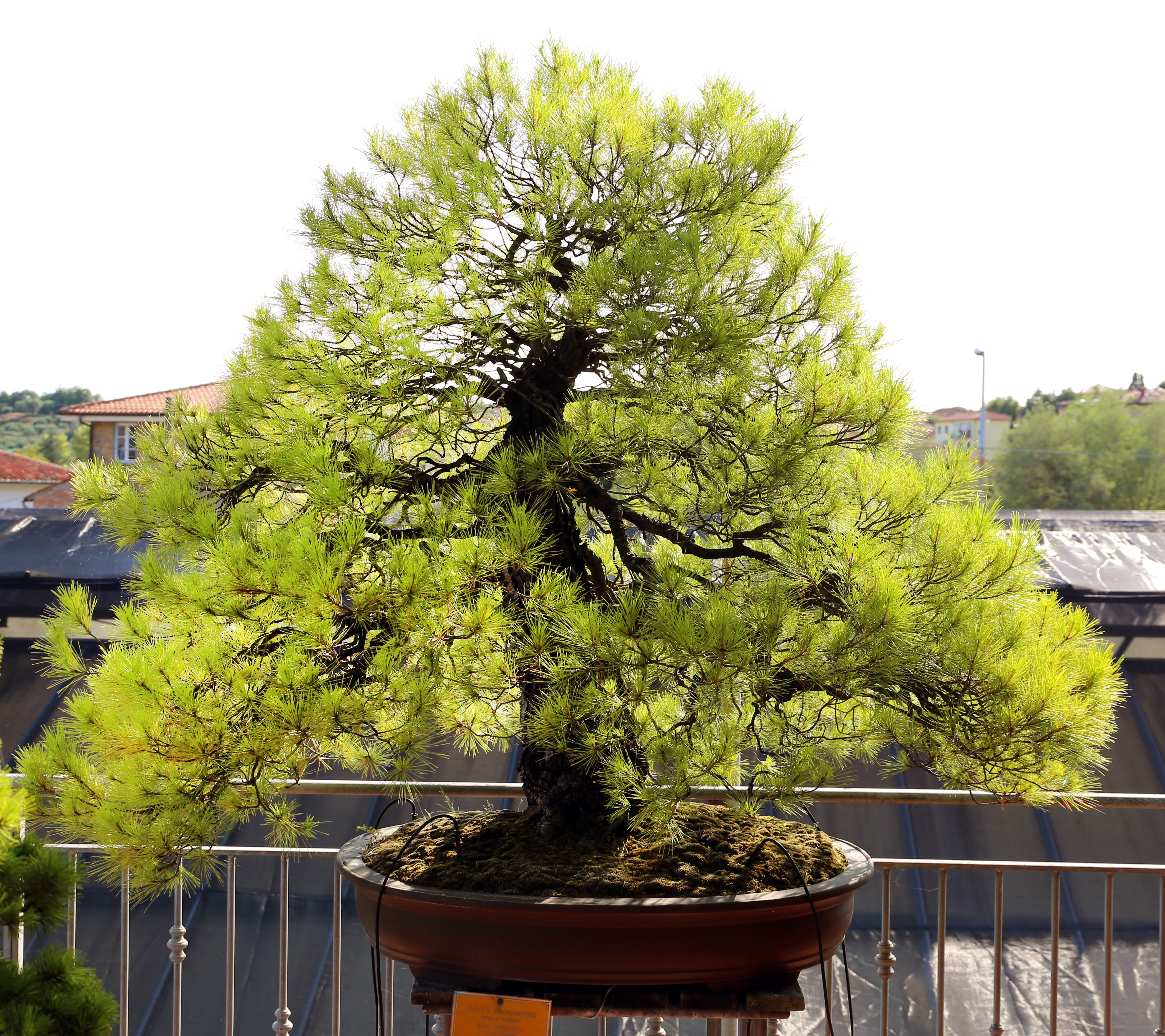 Museo del bonsai This is a photo of a monument which is part of cultural heritage of Italy.